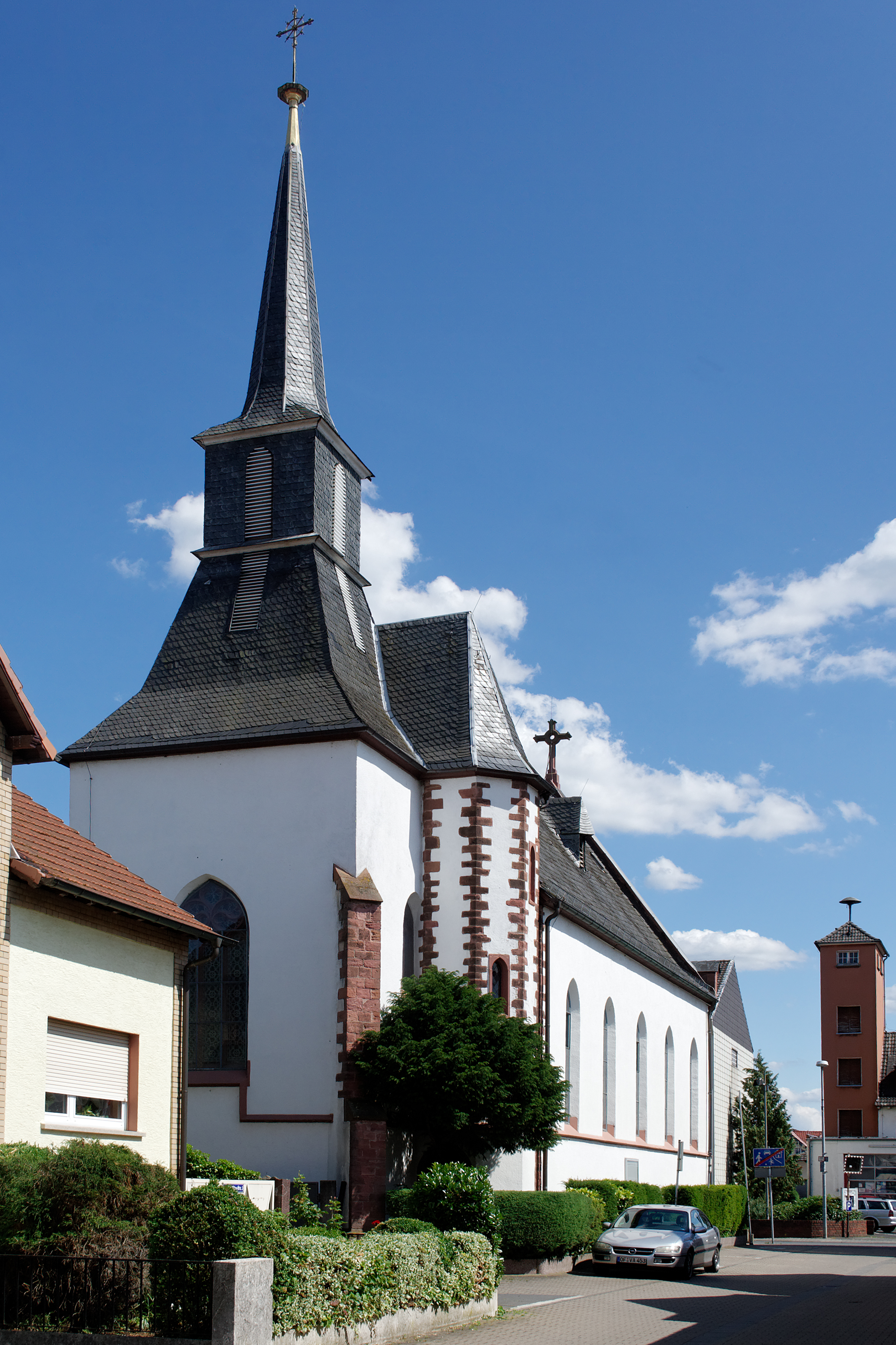 Katholische Kirche St. Rochus in Hainhausen, einem Stadtteil von Rodgau (Hessen). Die Kirche wurde 1891–1893 erbaut.